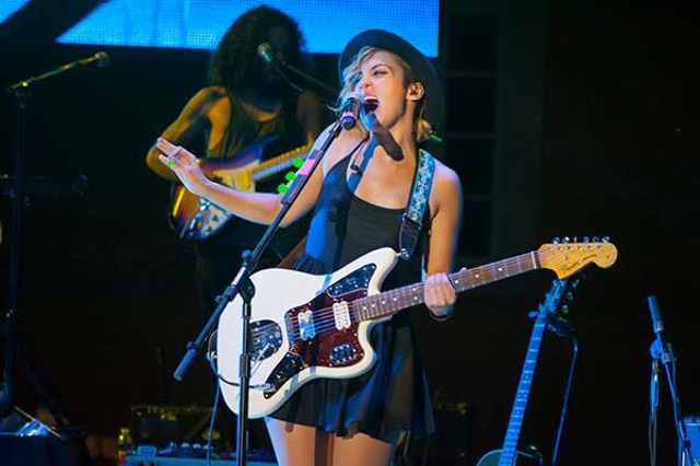 Cecy Leos en Vivo